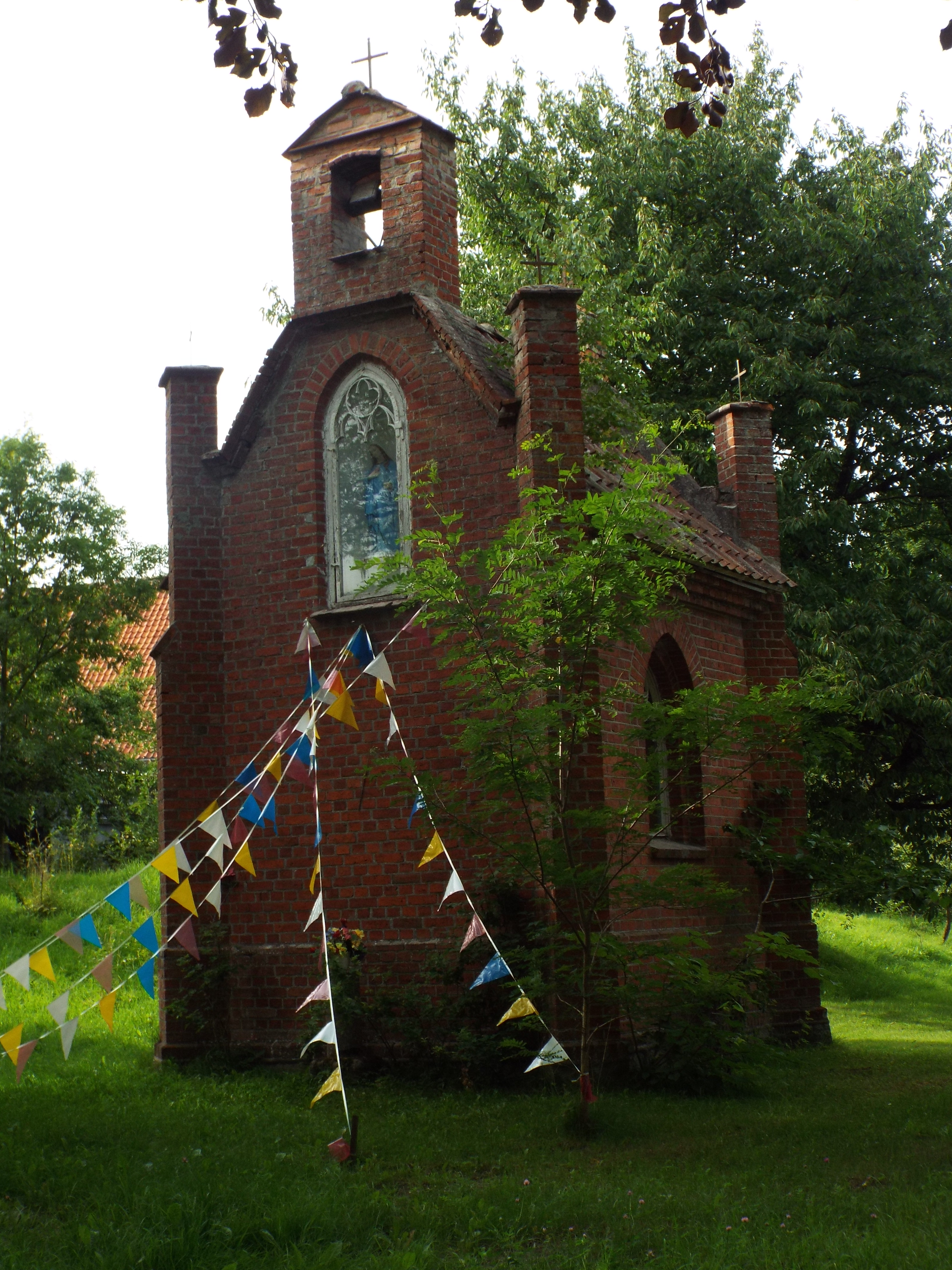 Brzezina - neogotycka kaplica